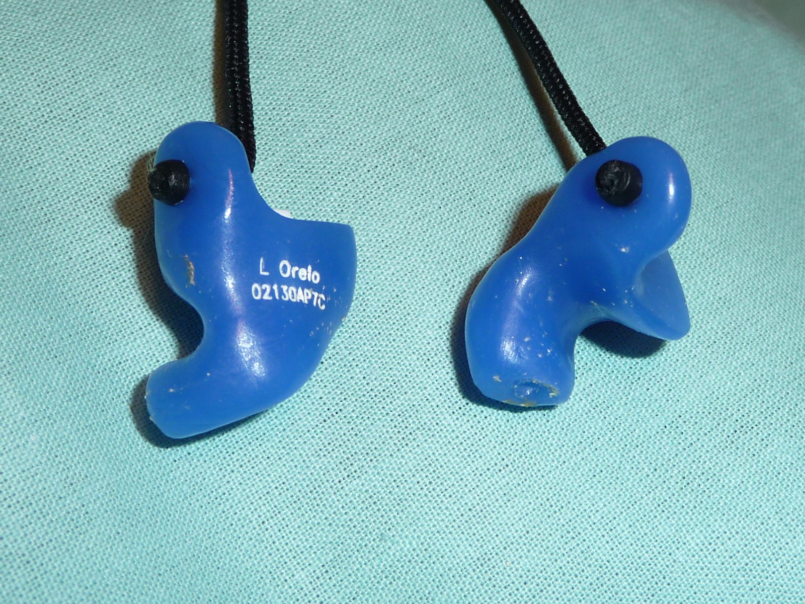 Anatomisesti muotoillut korvatulpat